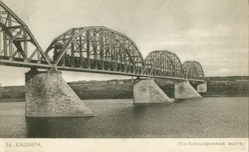 Железнодорожный мост через Оку около города Кашира